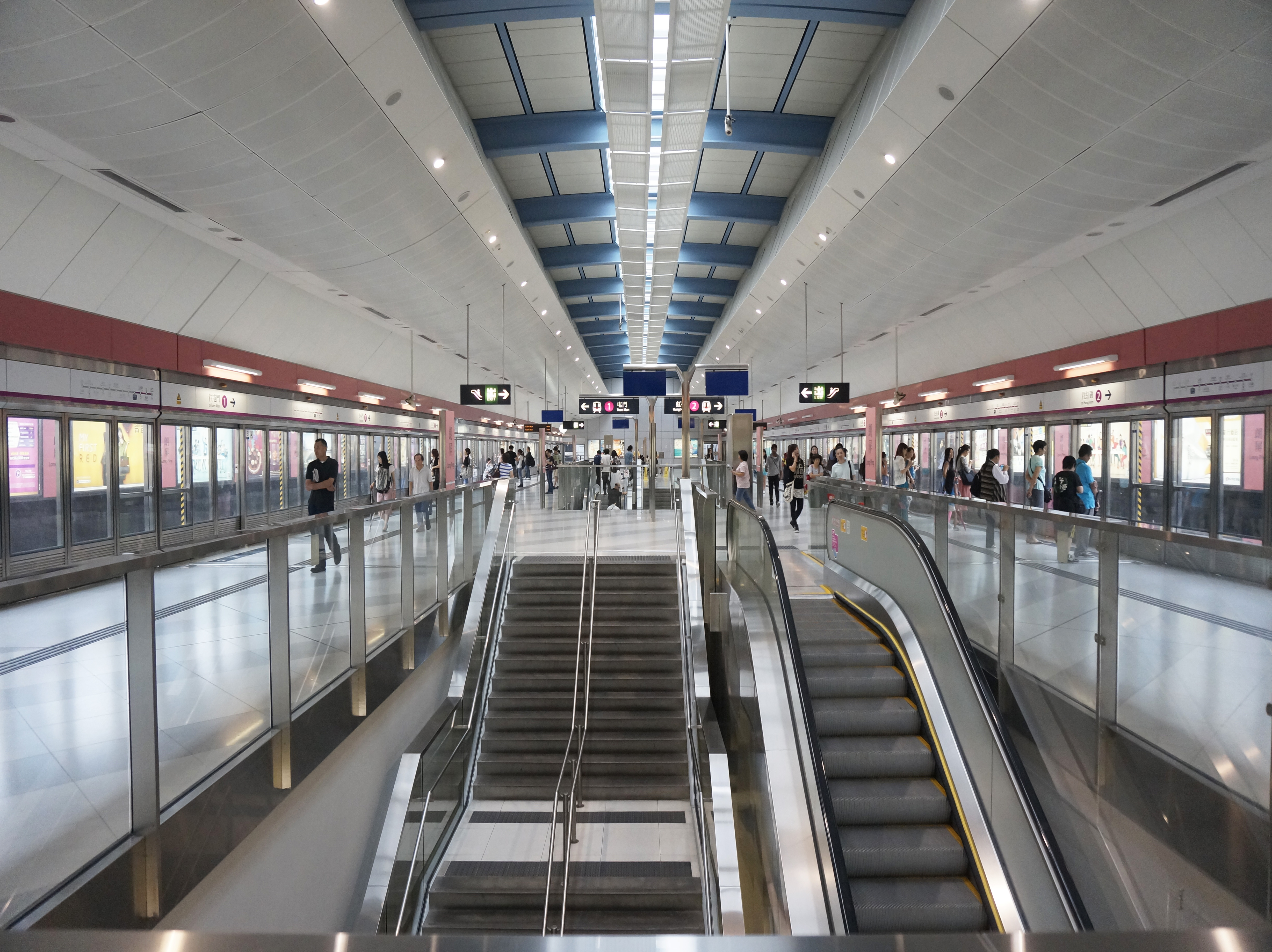 港鐵朗屏站月台中庭